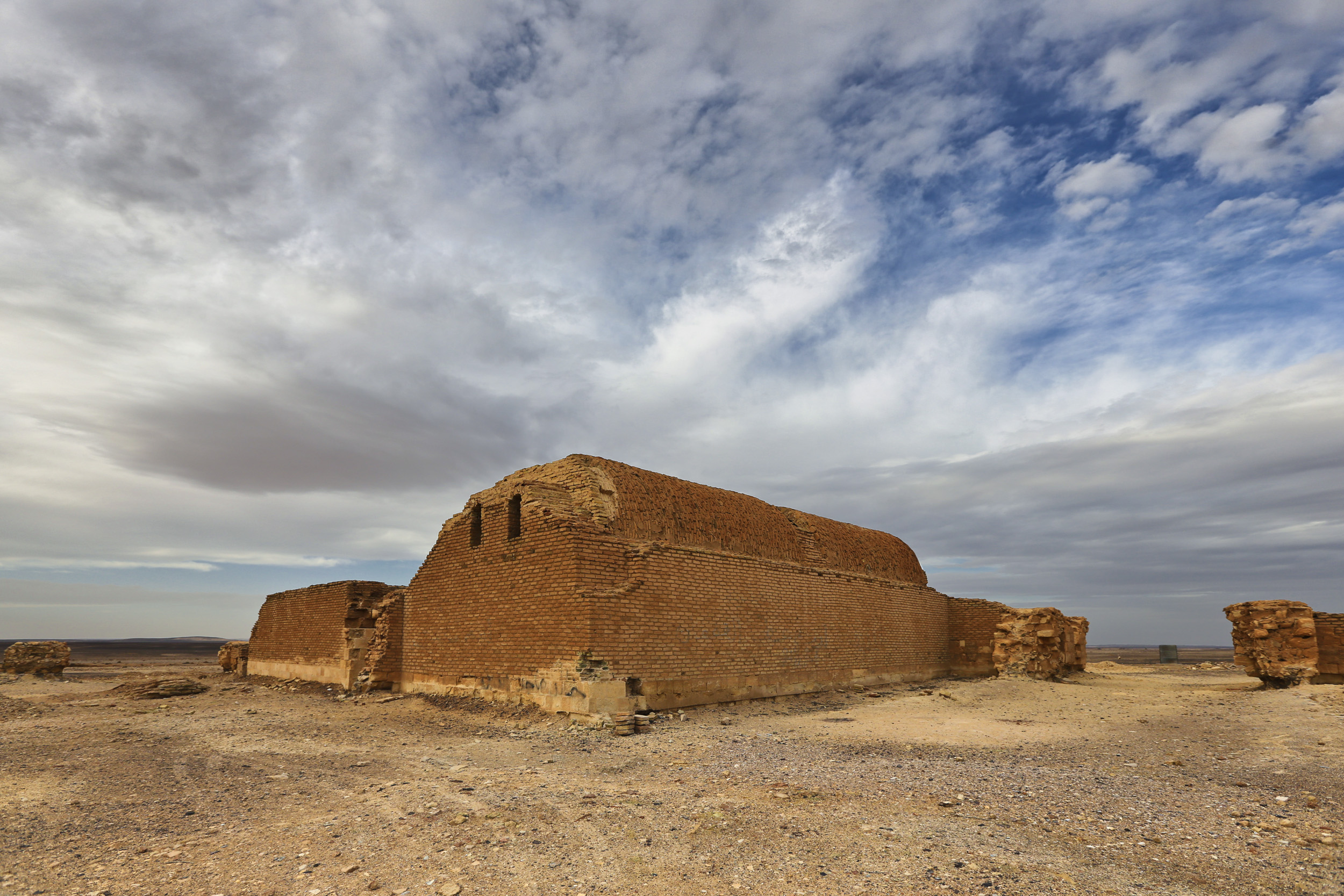 صورة شاملة لقصر طوبة الذي يقع في العاصمة عمان الأردنية ،حيث توضح الصورة جمال البناء وشكله المستطيل مع الجدار المستدير